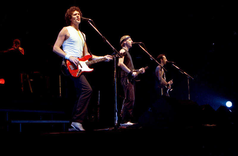 Dire Straits, Drammenshallen, Norway